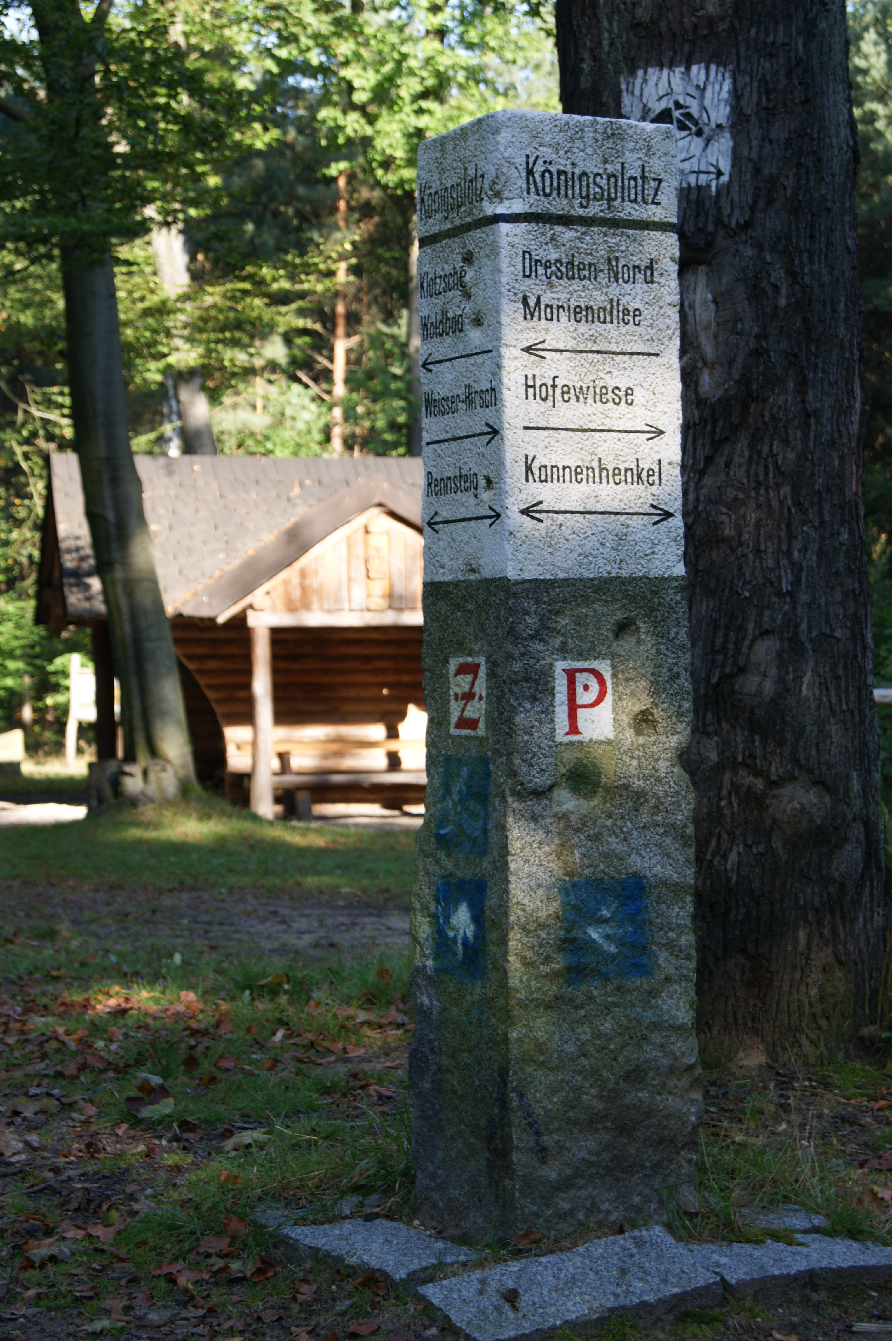 Wegsäule am Königsplatz in der Dresdner Heide